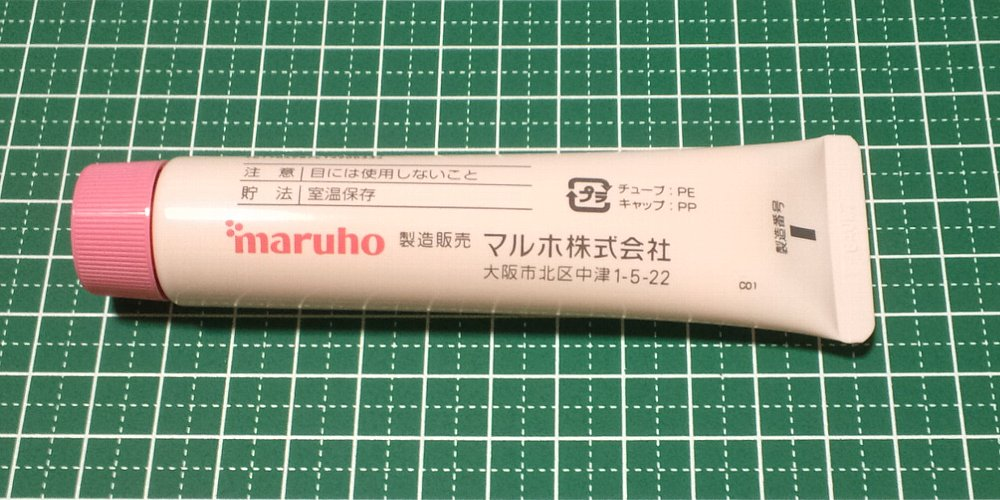 ヒルドイド®ソフト軟膏0.3% 25g（裏）。2016年8月20日撮影。